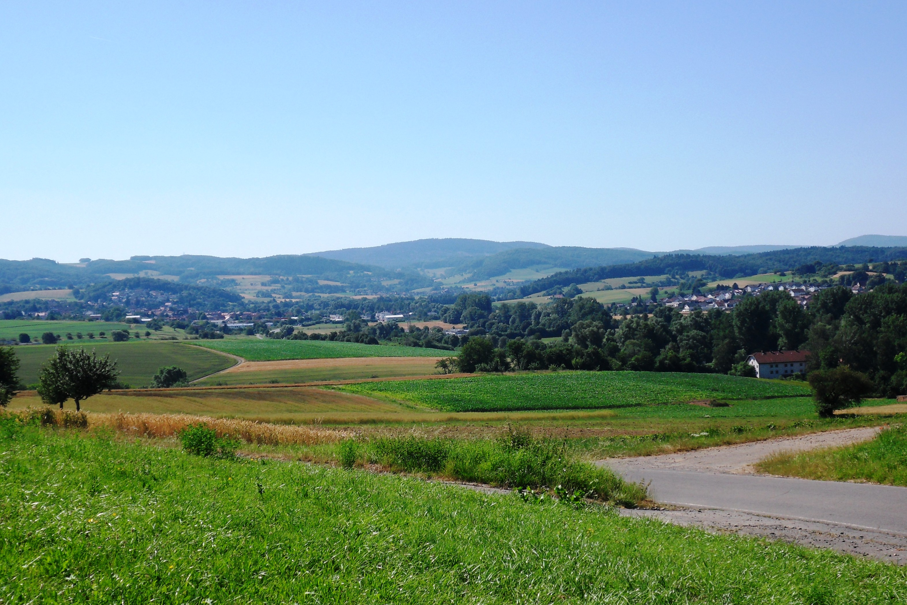 Blick vom Ortsrand von Hippelsbach nach Süden über das obere Gersprenztal, das am Horizont von der beherrschenden Höhe des 517 m hohen Morsberg abgeschlossen wird. Von dort zieht sich das Kainsbachtal hinunter zur Gersprenz. Im Mittelgrund liegt Brensbach und am rechtem Bildrand, teilweise verdeckt von den Bäumen in der Talaue der Gersprenz, die Ortschaft Wersau.